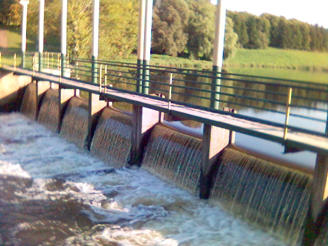 Pequeña presa en río Barupė; Labūnava, Lituania